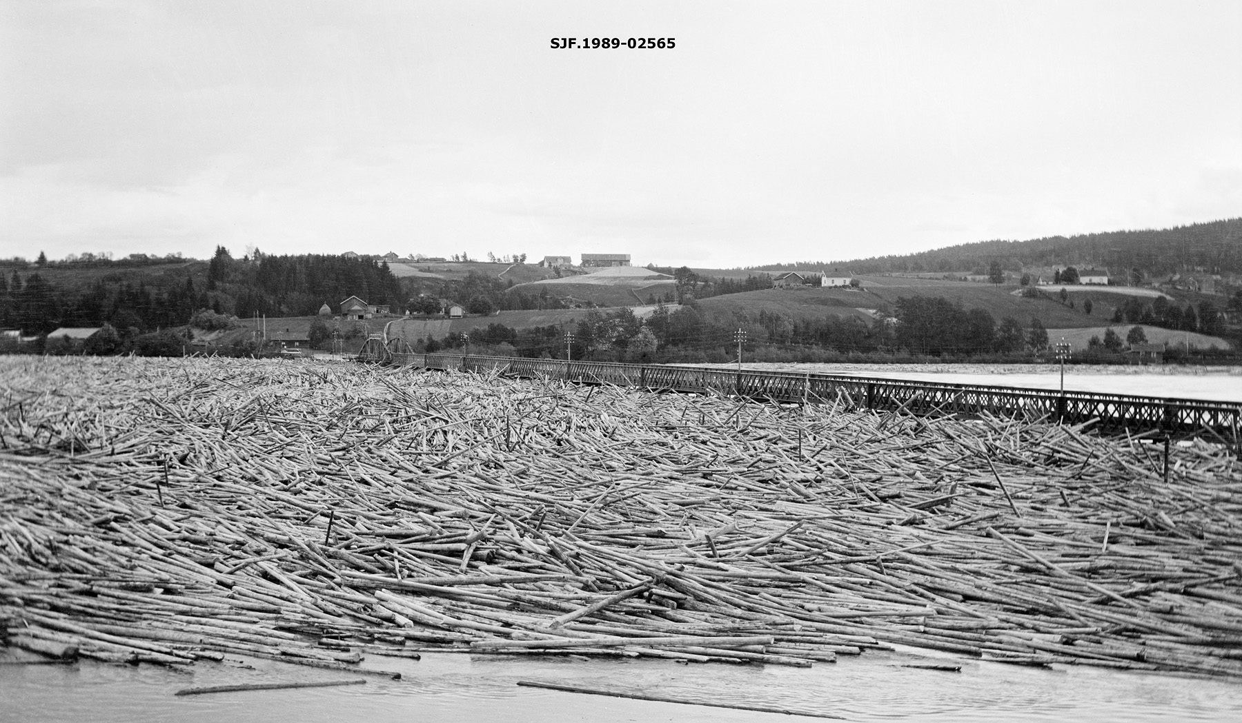 Tømmervase ved Fetsund bru 1910